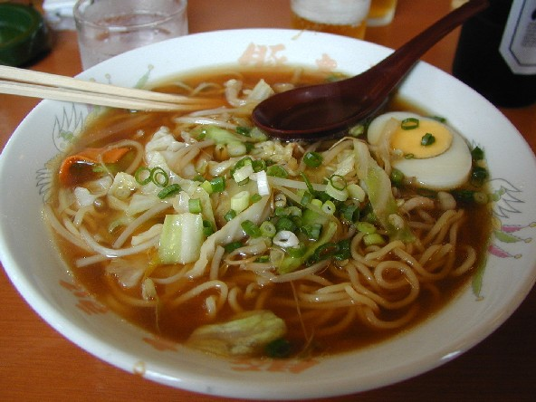 Ramen La foto è stata scattata da me a Kochi nell'isola dello Shikoku (Giappone) il 12 agosto 2002